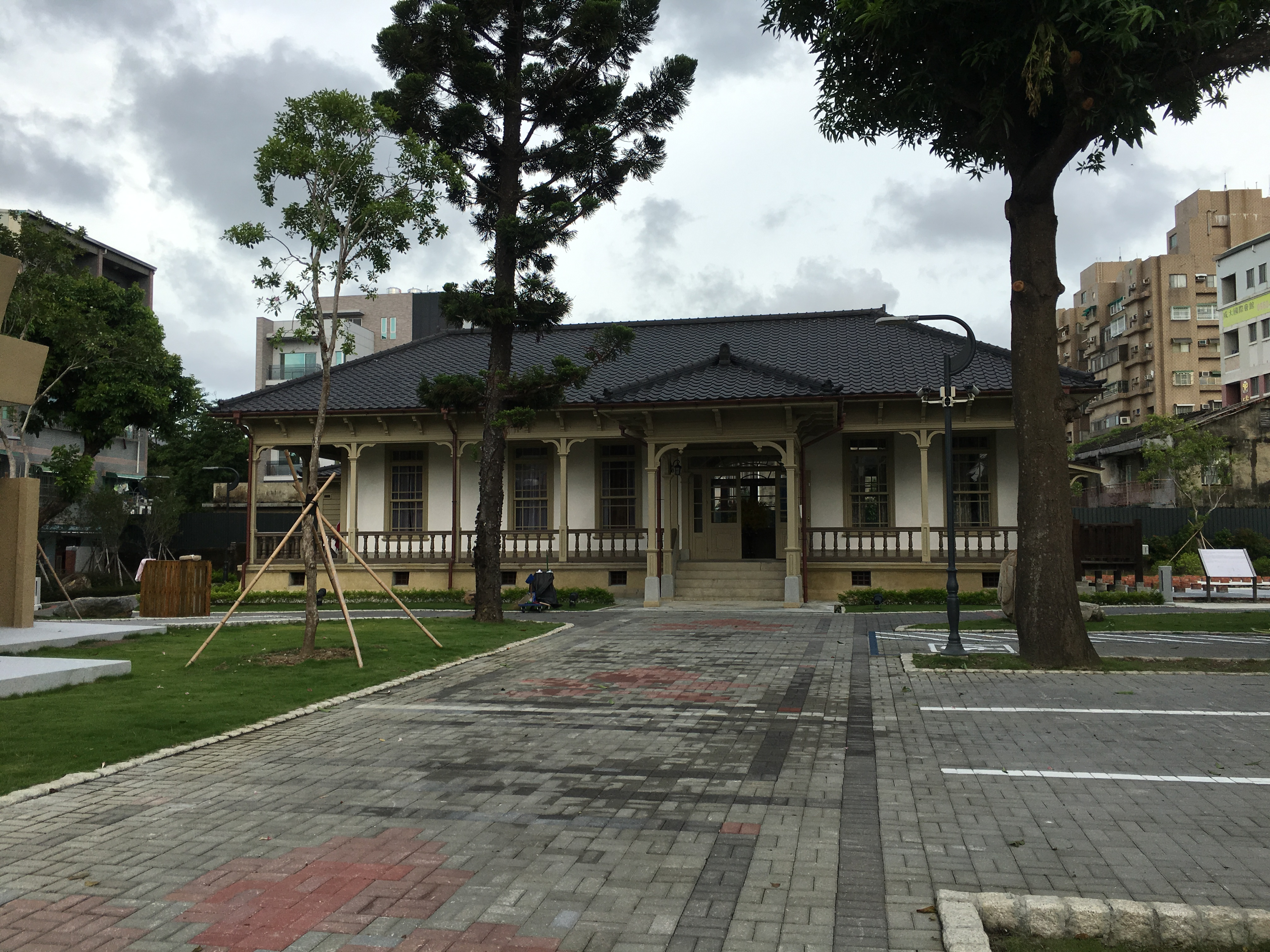 已修復完工的原臺南廳長官邸。